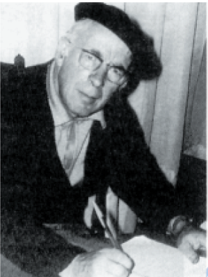 Piarres Lartzabal